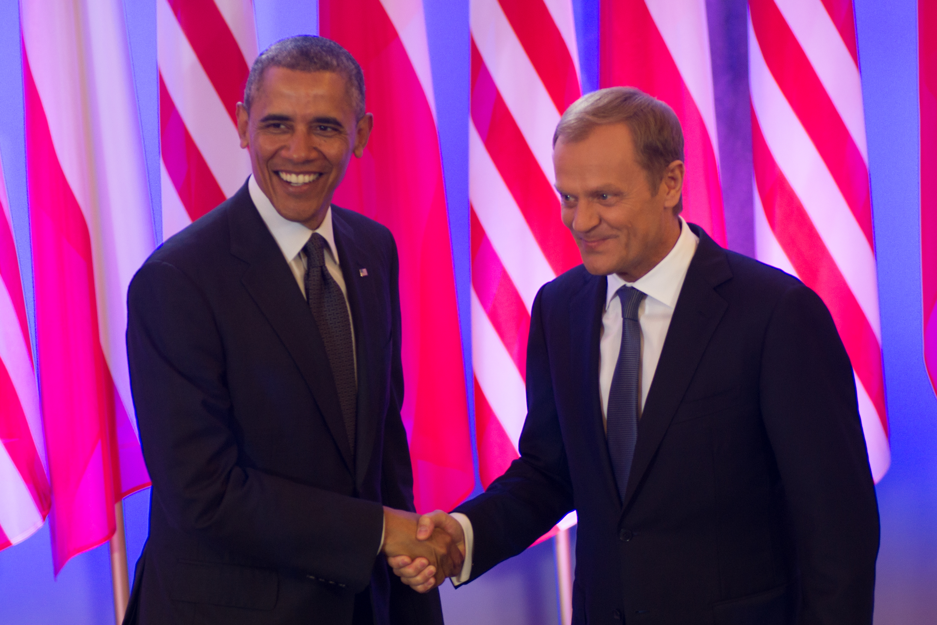 Poland 25th Anniversary of Freedom - with President Barack Obama, President Bronisław Komorowski and Prime Minister Donald Tusk - 4 June 2014 - Warsaw, Poland